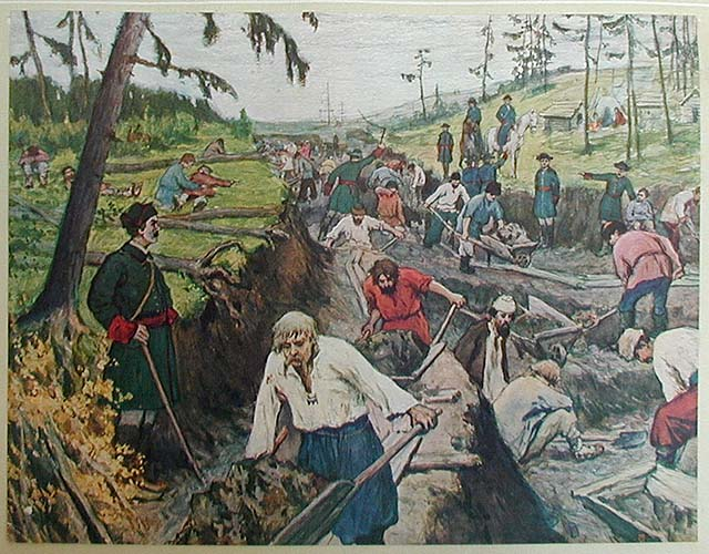 Ladoga's Channel